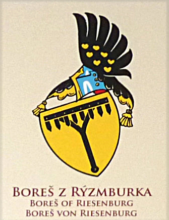 Besitzer der Herrschaft Mährisch Trübau (Moravská Třebová) Wappen der Boresch von Riesenburg (Boreš z Rýzmburka)